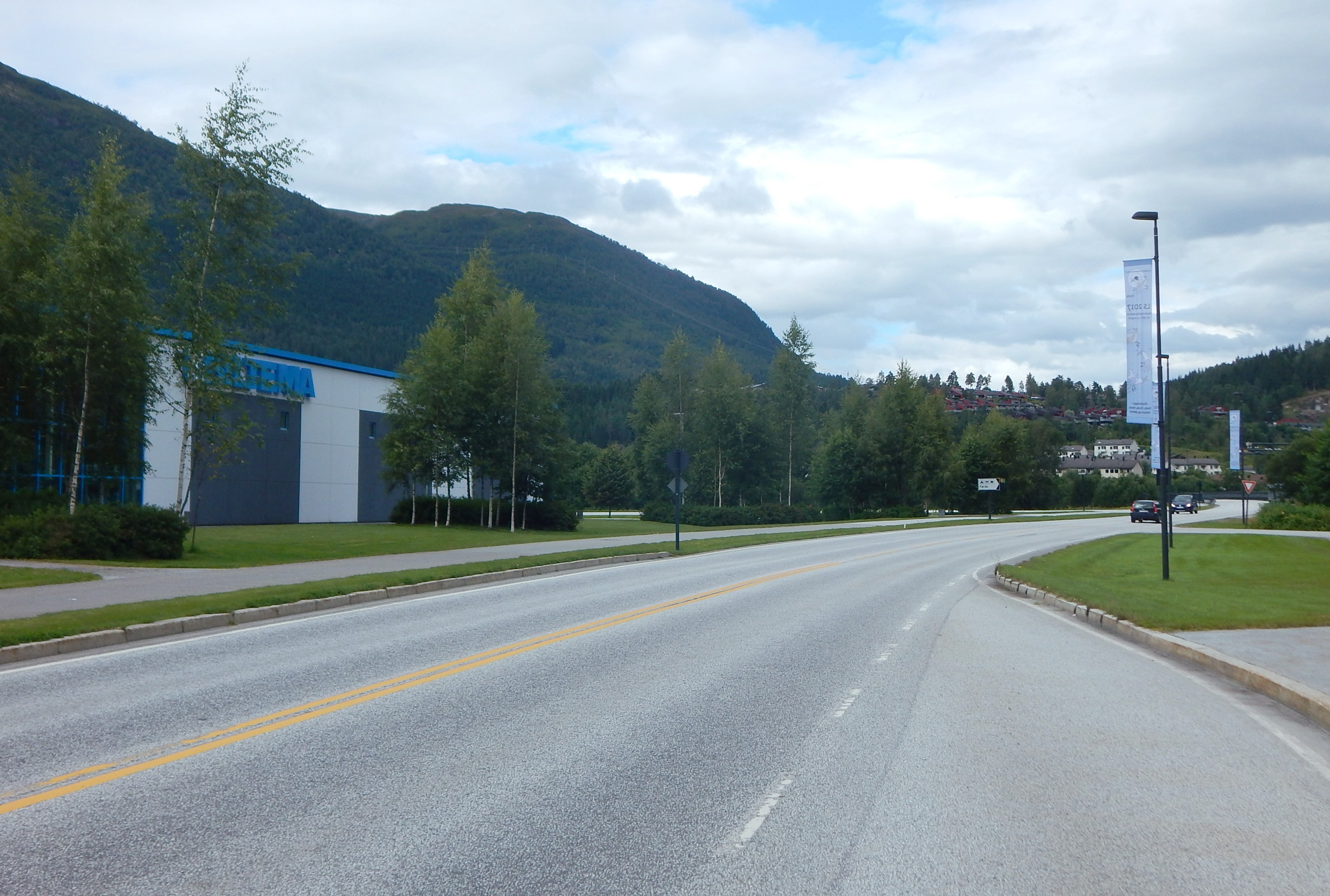 Fylkesvei 484 i Førde, i retning mot sykehuset fra E39